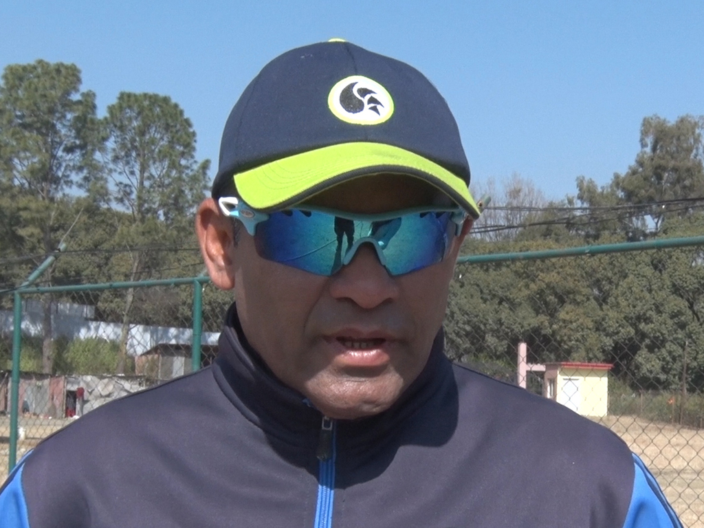 नेपाली: जगत बहादुर टमटा